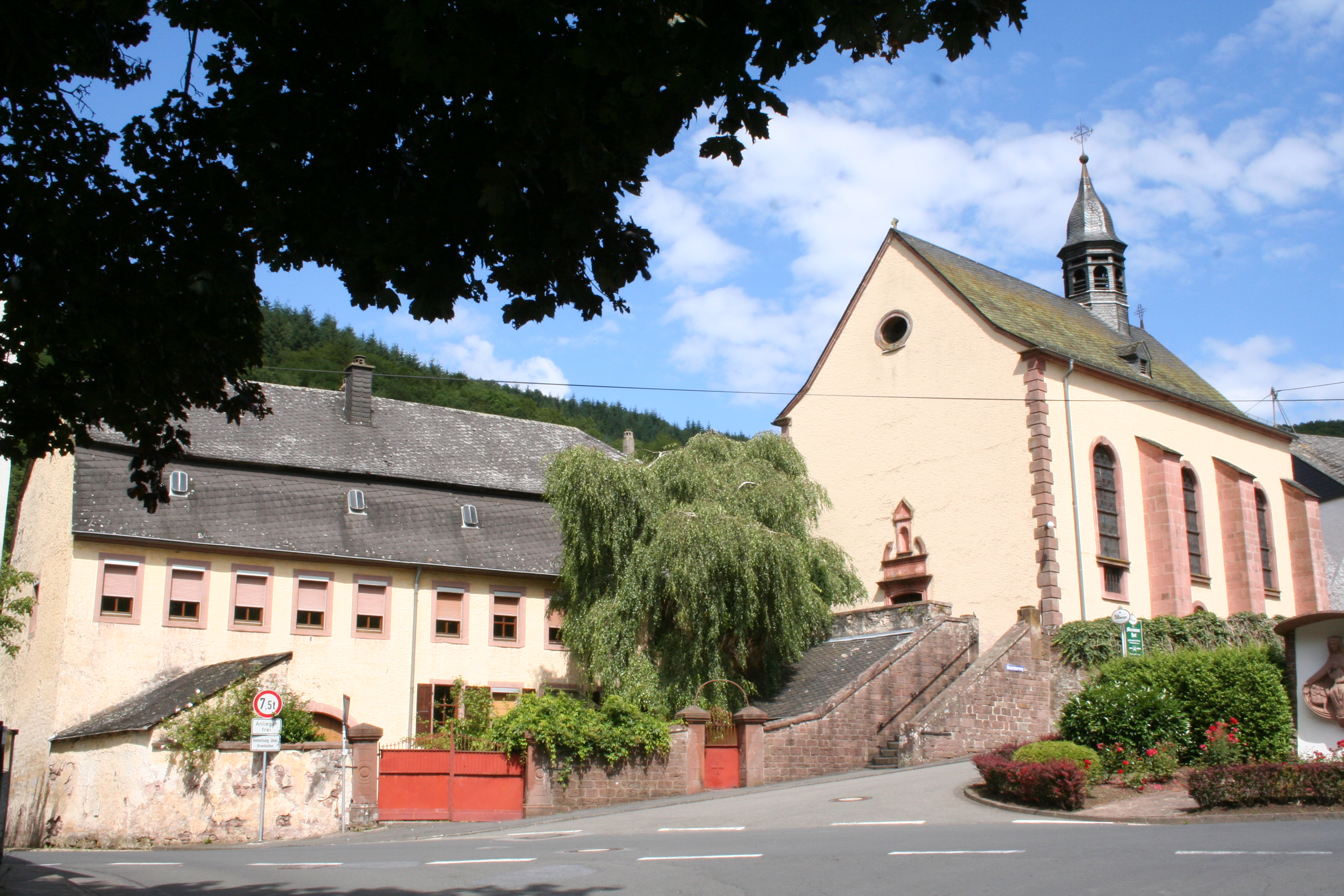 Kirche und Pfarrhaus in Auw an der Kyll, Rheinland-Pfalz, Deutschland